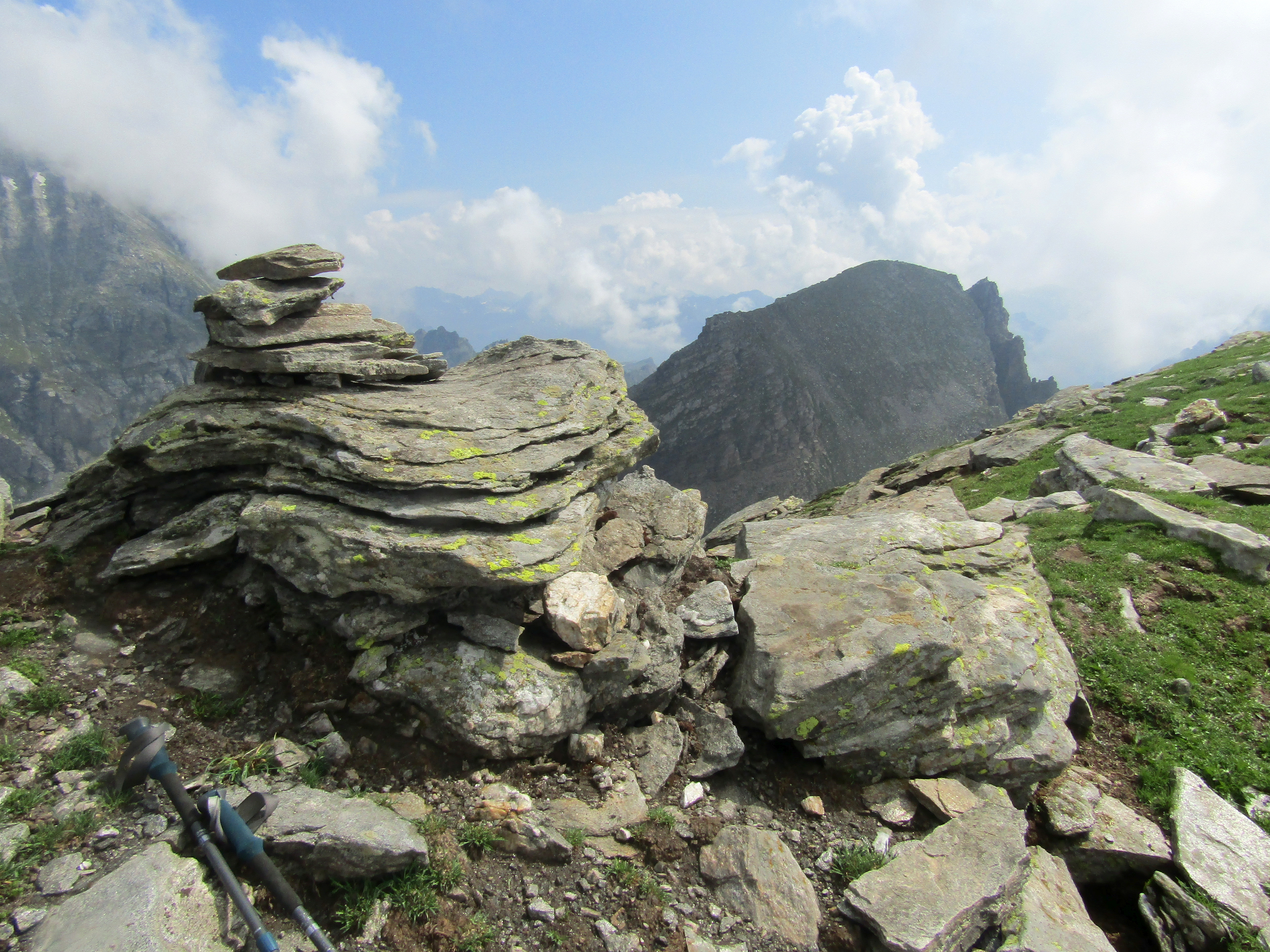 L'ometto sulla cima della Punta Salarioli, sullo sfondo la Cima di Valtendra